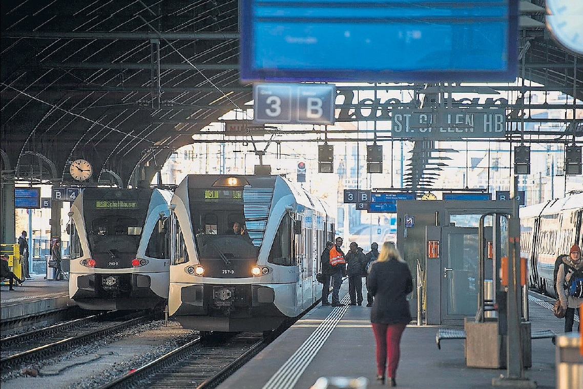 Hauptbahnhof St. Gallen mit S8 nach Schaffhausen und S1 nach Wil